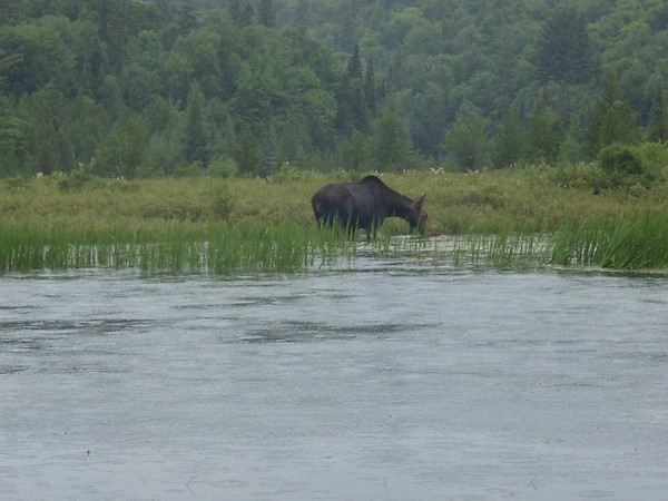 Female Moose in Algonquin Park